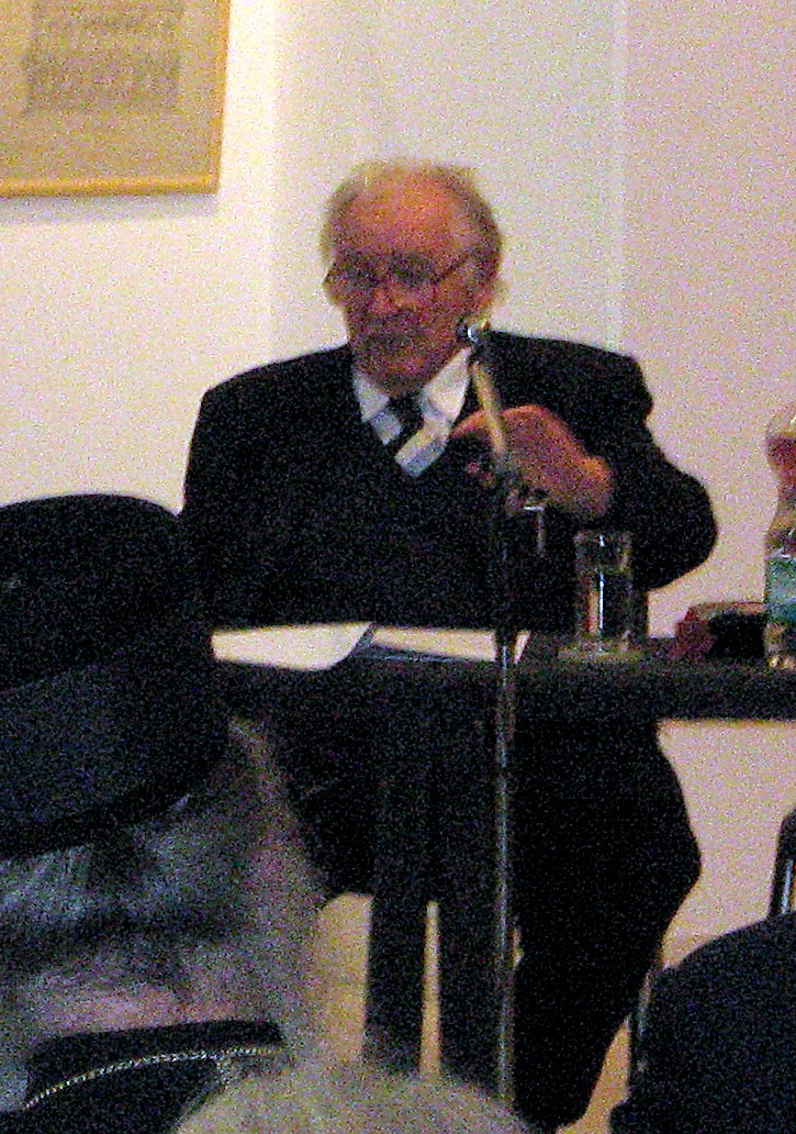 Дејан Медаковић (1922), говори у Галерији САНУ, октобар 2007. године